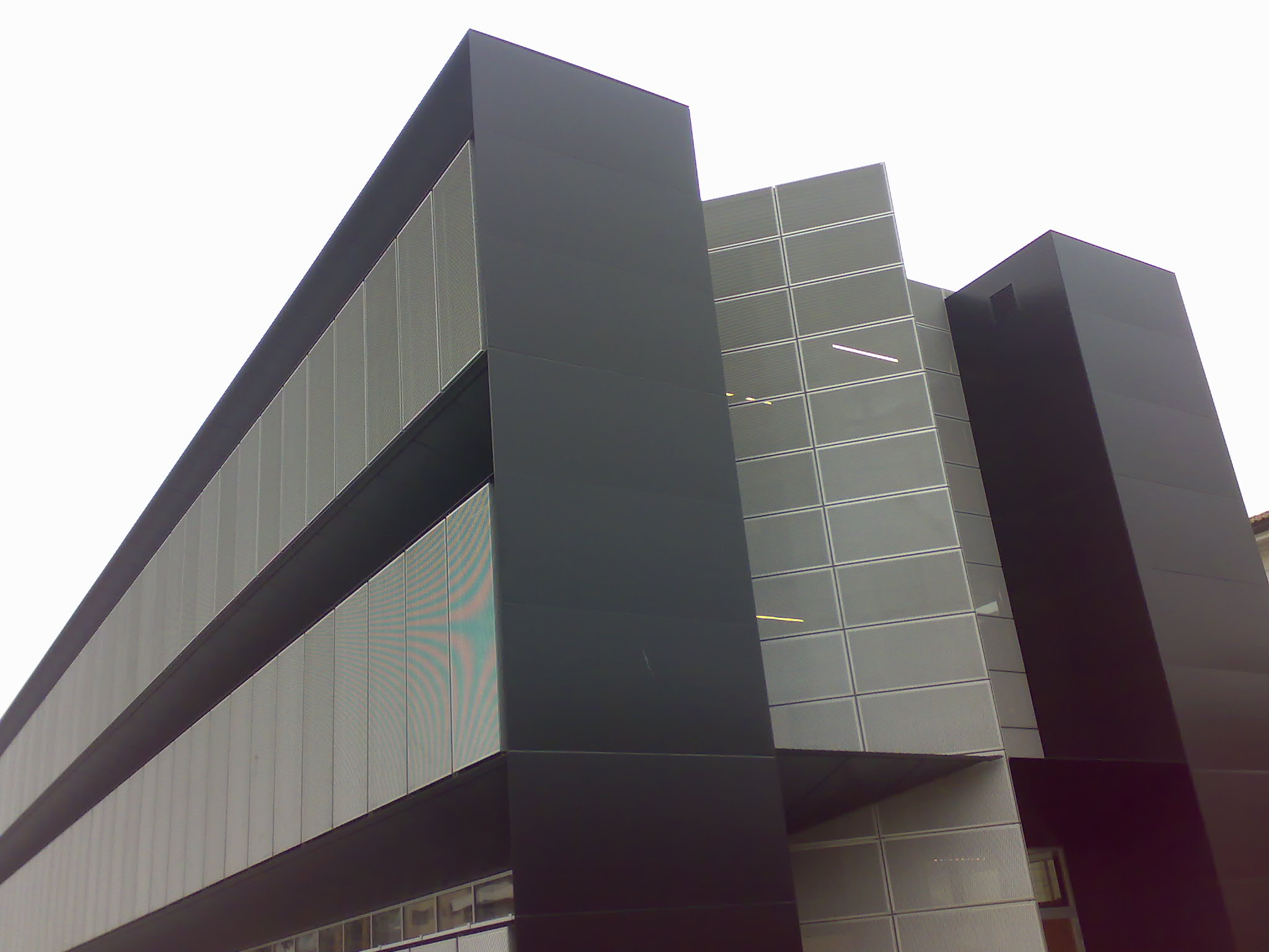 Università della Svizzera Italiana (Lugano, Switzerland); Faculty of Informatics